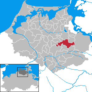 Wittenhagen in Mecklenburg-Vorpommern - District Nordvorpommern